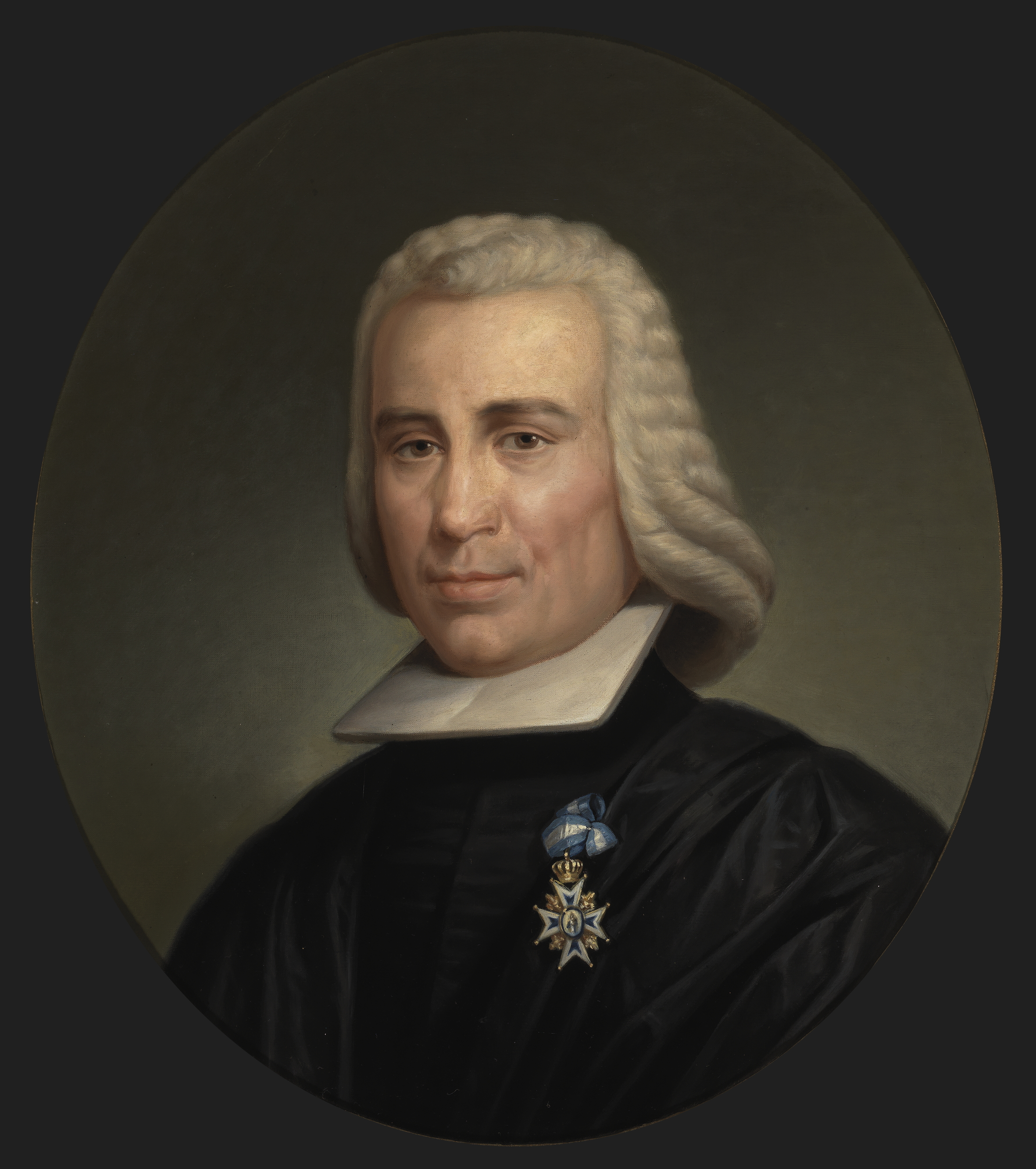 Retrato del politico e ilustrado español Pedro Rodríguez de Campomanes (1723-1802), que fue el primer conde de Campomanes.